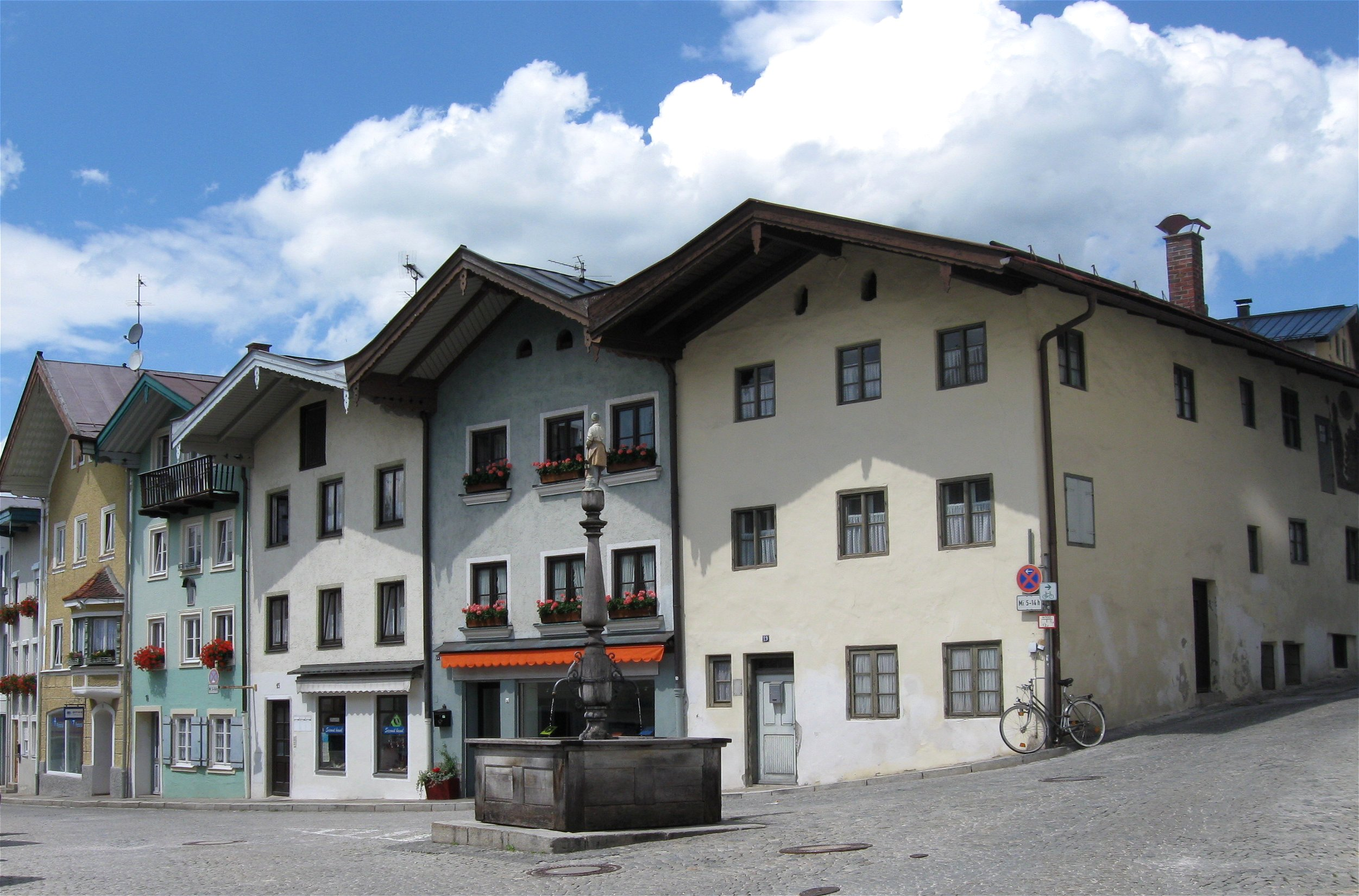 sog. Nagelschmiedbrunnen, gefasste Eisengussfigur auf hölzerner Sockelsäule inmitten eines quadratischen Brunnenbeckens, 3. Viertel 19. Jh. Jungmayrplatz 11: Wohnhaus mit Laden, dreigeschossiger putzgegliederter Satteldachbau mit Erker und weit vorkragendem Vordach, bez. 1912. Jungmayrplatz 13: Wohnhaus, dreigeschossiger putzgegliederter Flachsatteldachbau mit Kniestock und Baluster-Hochlaube, 1. Hälfte 19. Jh. Jungmayrplatz 15: Wohnhaus, dreigeschossiger Flachsatteldachbau mit profilierten Balkenköpfen am weit vorkragenden Vordach, 1. Hälfte 19. Jh. Jungmayrplatz 17: Wohnhaus mit Laden, dreigeschossiger Flachsatteldachbau mit stuckierten Sohlbankgesimsen und Giebelluken, 18./19. Jh. Jungmayrplatz 19/19a/19b: Doppelhaus, drei- bzw. zweigeschossiger ecklagiger Flachsatteldachbau mit Giebelluken und Wandbild, im Kern noch 17. Jh., nordseitig bez. 1820, Fresko übergangen.